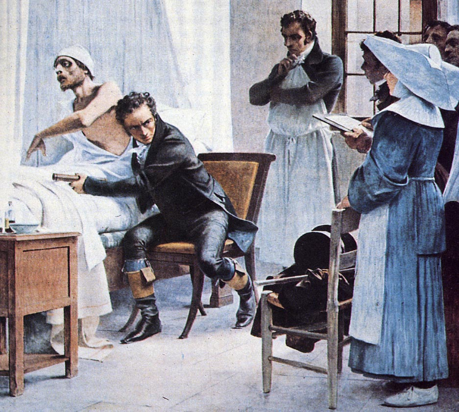 "Laënnec à l'hôpital Necker ausculte un phtisique devant ses élèves (1816)" ("Laennec examines a consumptive patient with a stethoscope in front of his students at the Necker Hospital"). Painting by Théobald Chartran.